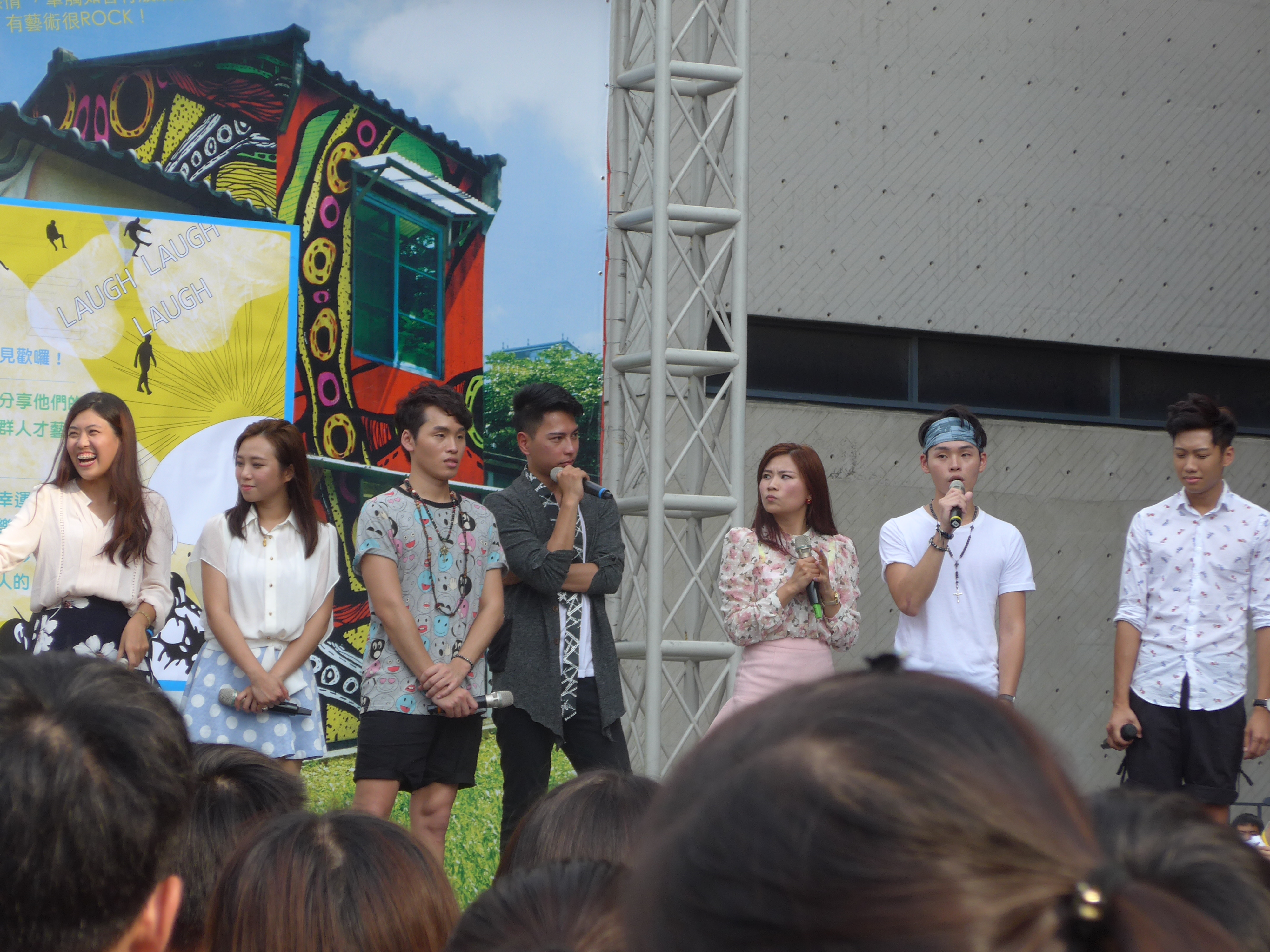 這群人在台中的粉絲見面會